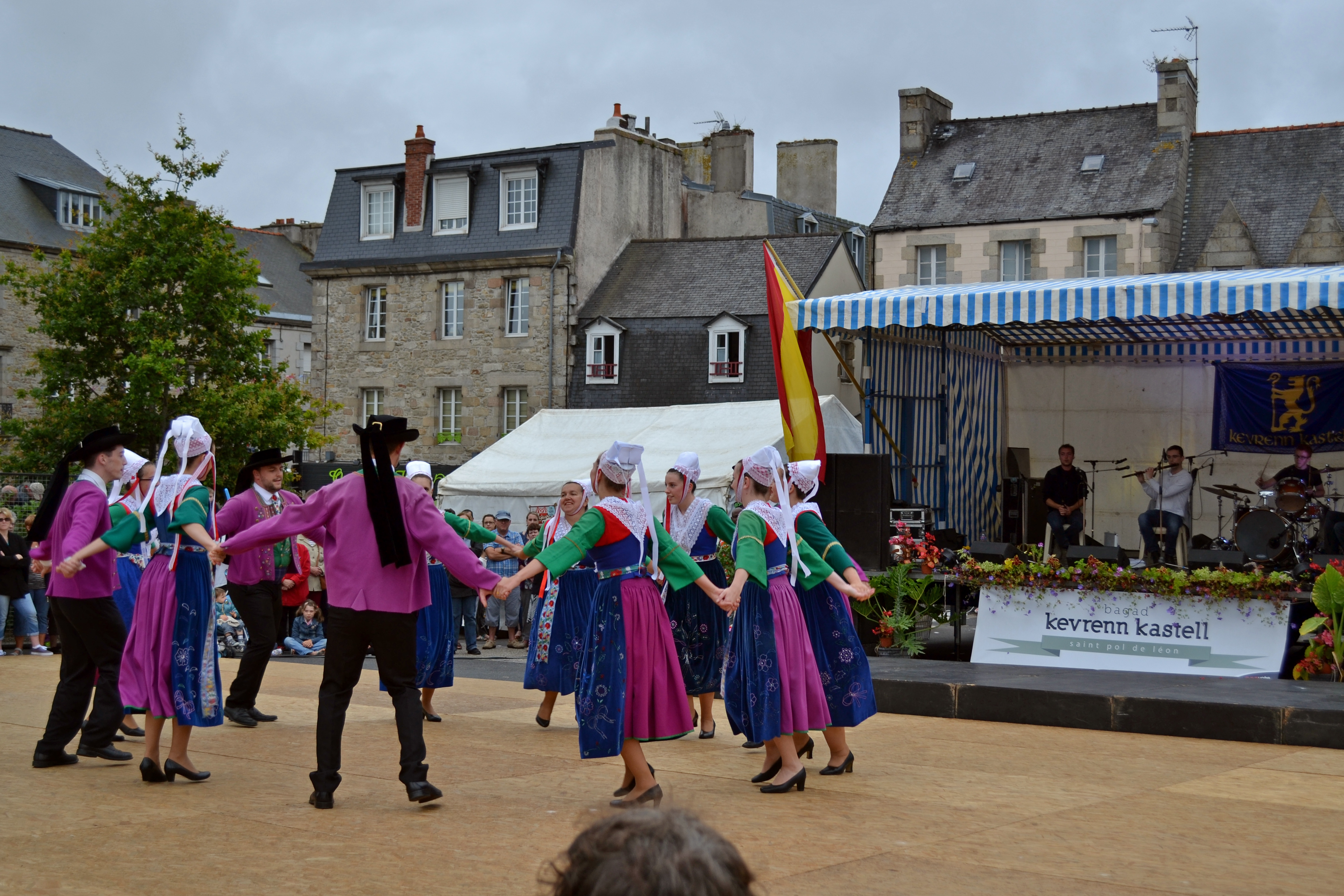 Spectacles organisée pour la journée anniversaire des 60 ans de la Kevrenn Kastell à Saint-Pol-de-Léon le 12 juillet 2014.